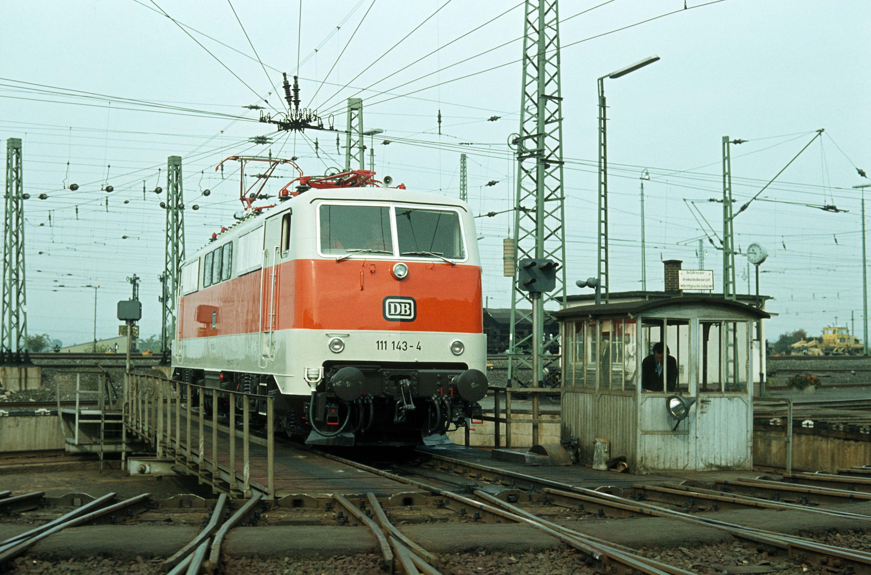 Die Abbildung zeigt die fabrikneue 111 143-4 auf ihrer Werksprobefahrt von Kassel nach gießen. die endgültige Abnahme fand am 12.11.1979 im AW München-Freimann statt.